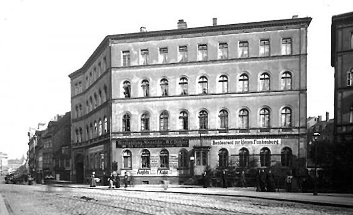 Die Kleine Funkenburg in Leipzig um 1905, davor der Ranstädter Steinweg Richtung Innenstadt